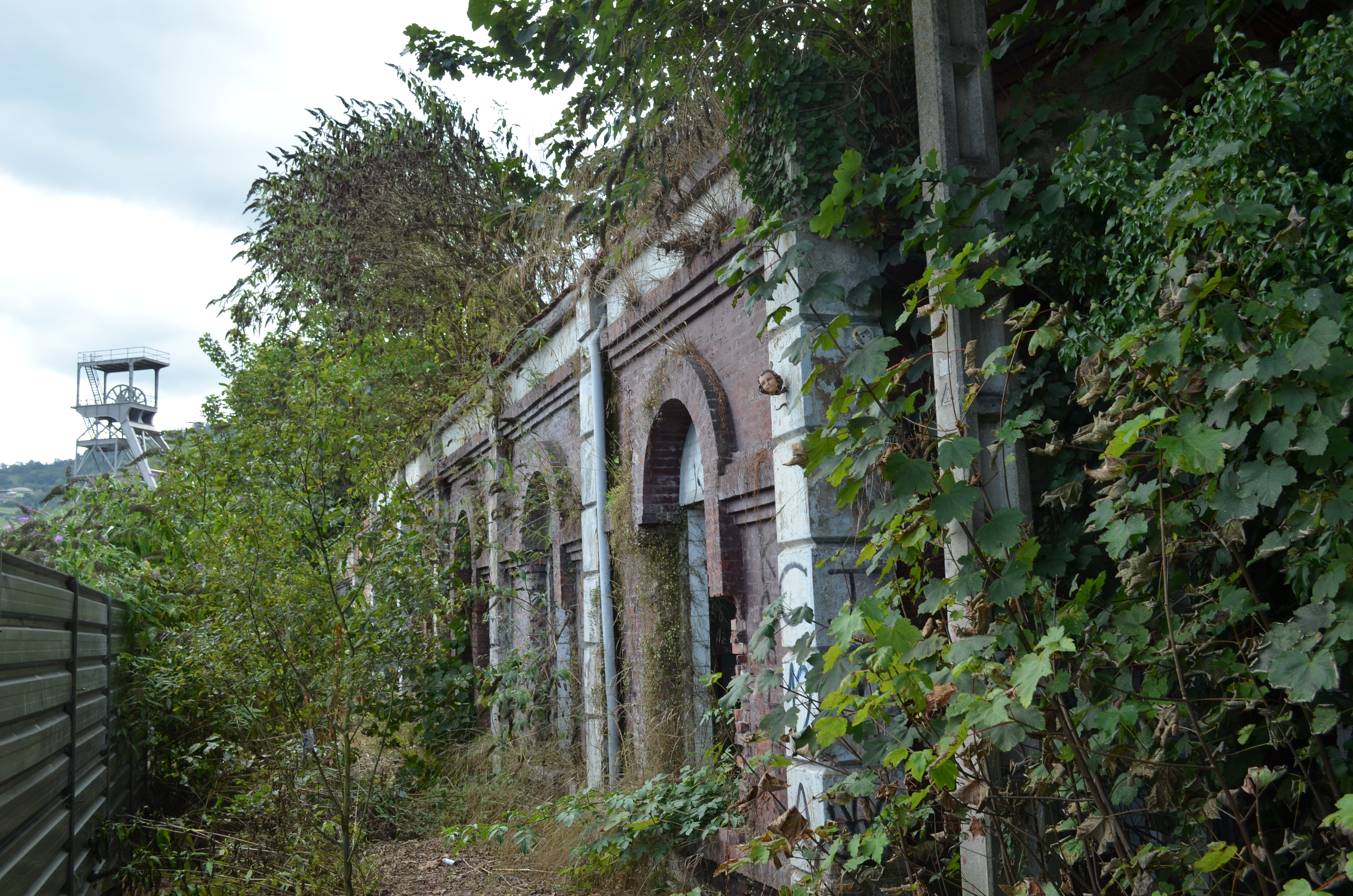 Antiguo pozo Modesta en Sama de Langreo, Asturias, northern Spain